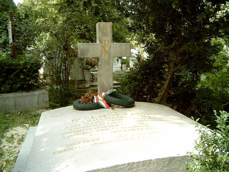 Semsey Andor sírja Budapesten. Farkasréti temető: 10/1-1-60/61.